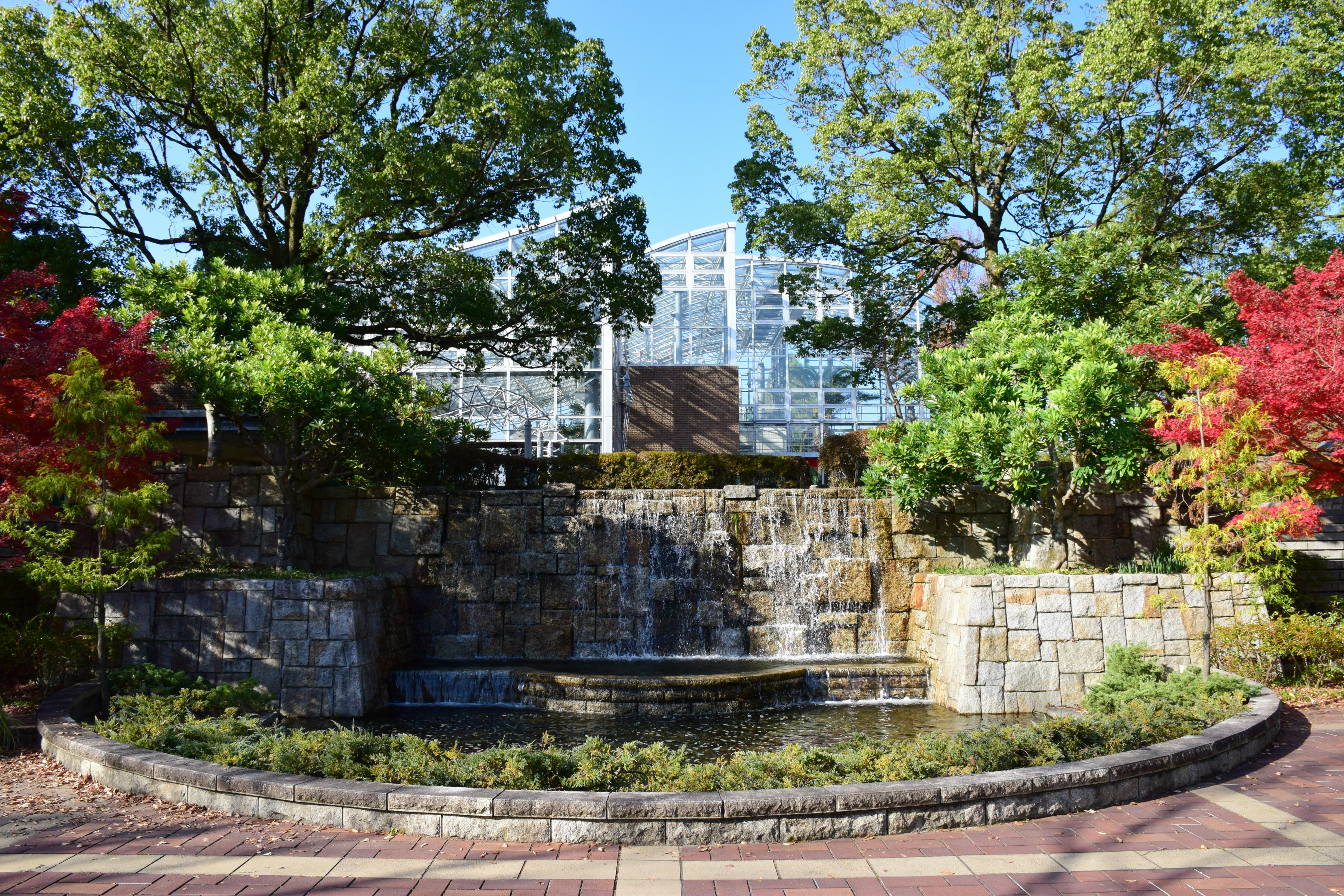 グリーンピア春日井